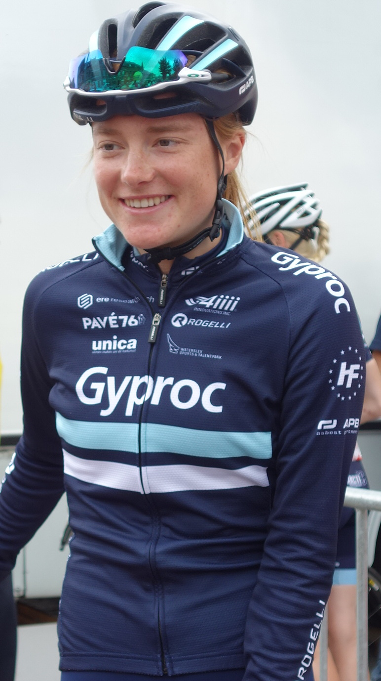 Start van de laatste etappe in Geraardsbergen van de Lotto Belgium Tour 2019